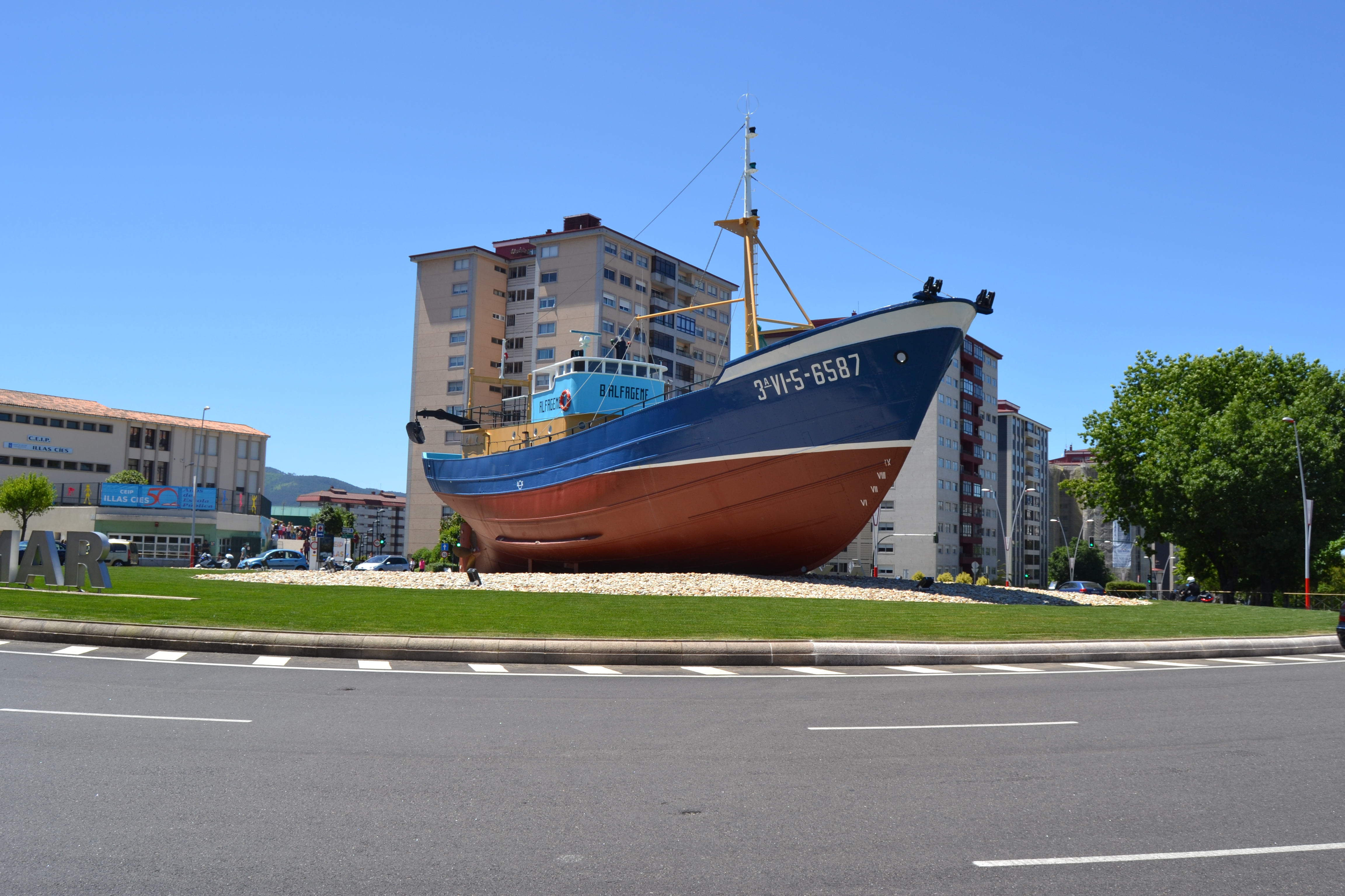 Barco Alfageme na rotonda de Coia, Vigo